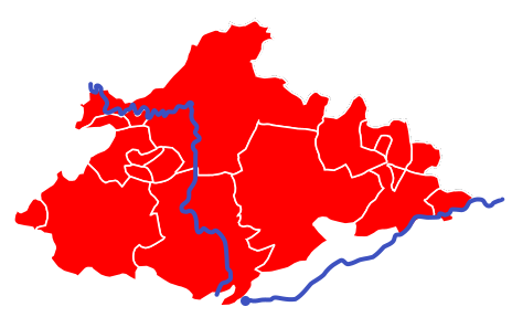 Passage de la Vire et du Noireau sur la communauté de communes "Intercom de la Vire au Noireau"